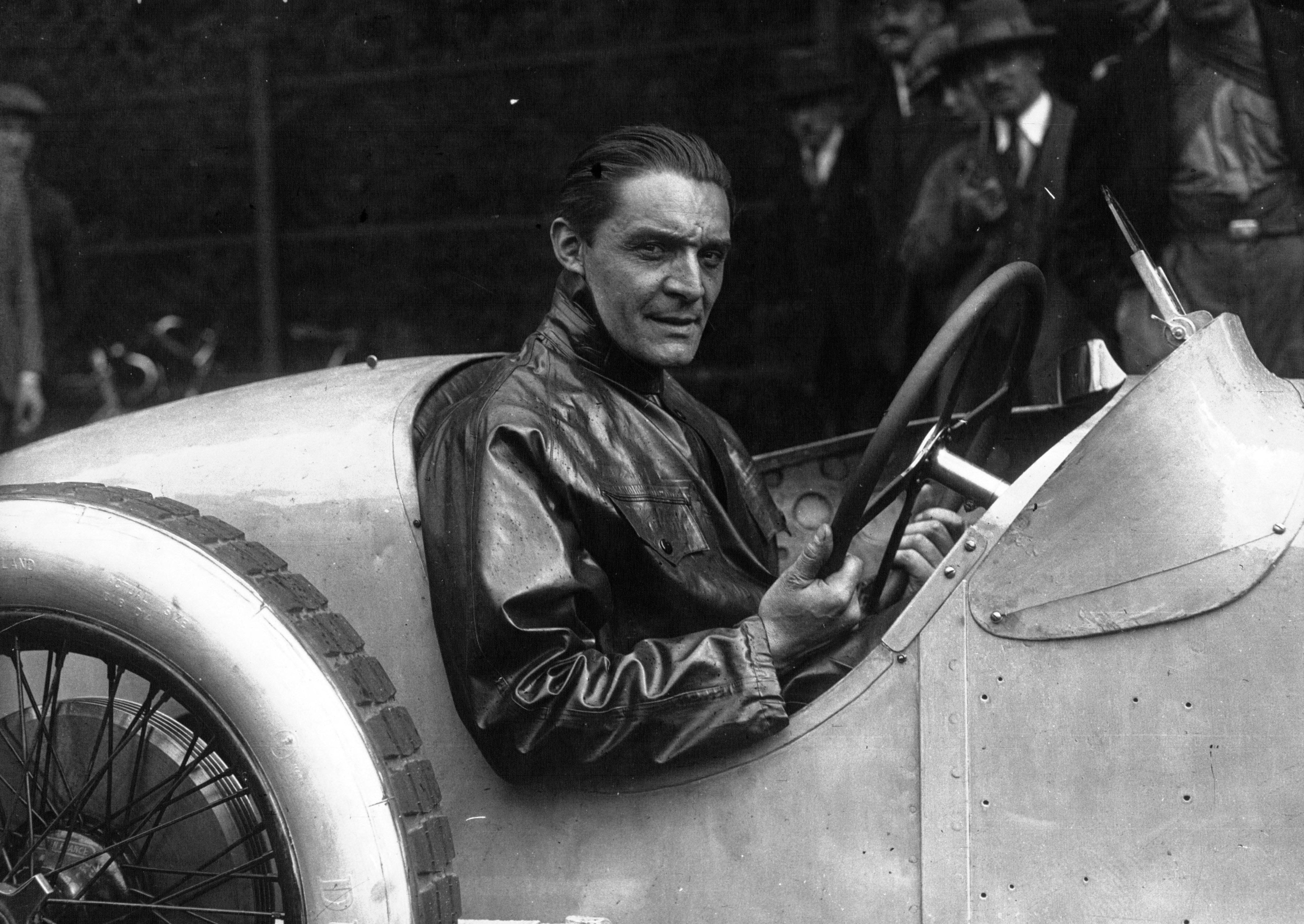 Robert Benoist au volant de sa Delage victorieuse à Monza.